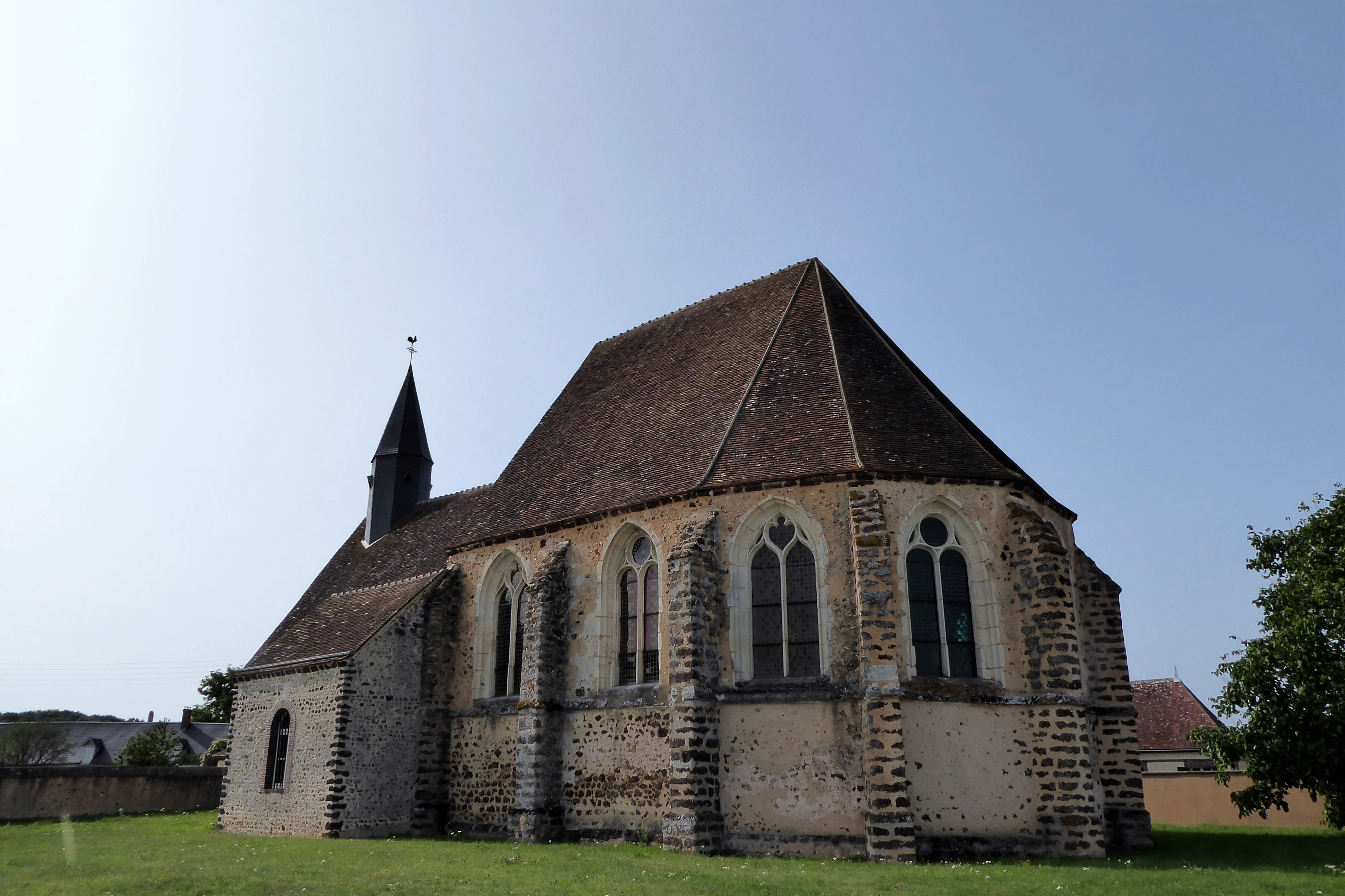 abside de l'église Saint Maurice, Friaize, Eure-et-Loir, France.